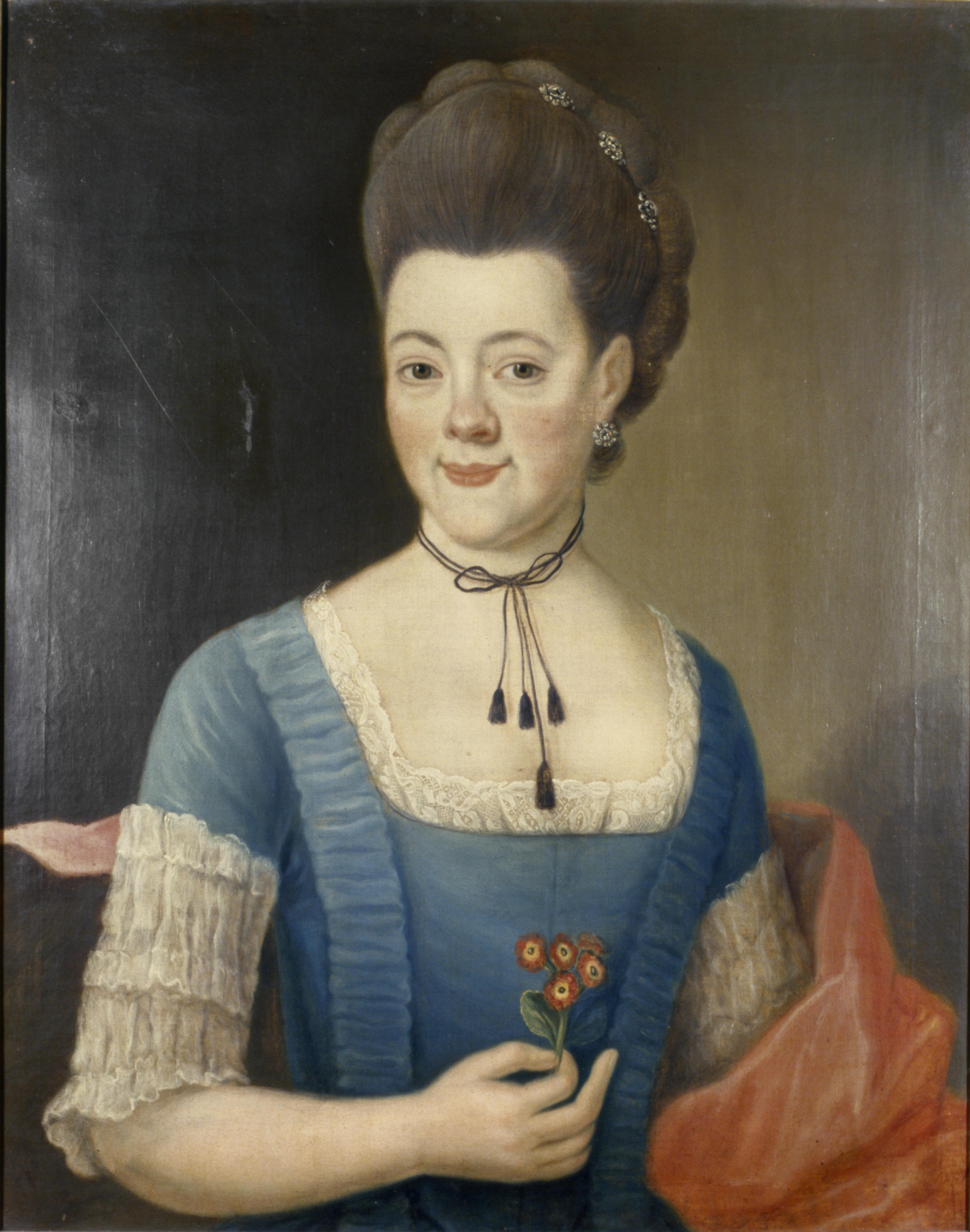 Susanna Christina Kymmell (1758-1825)